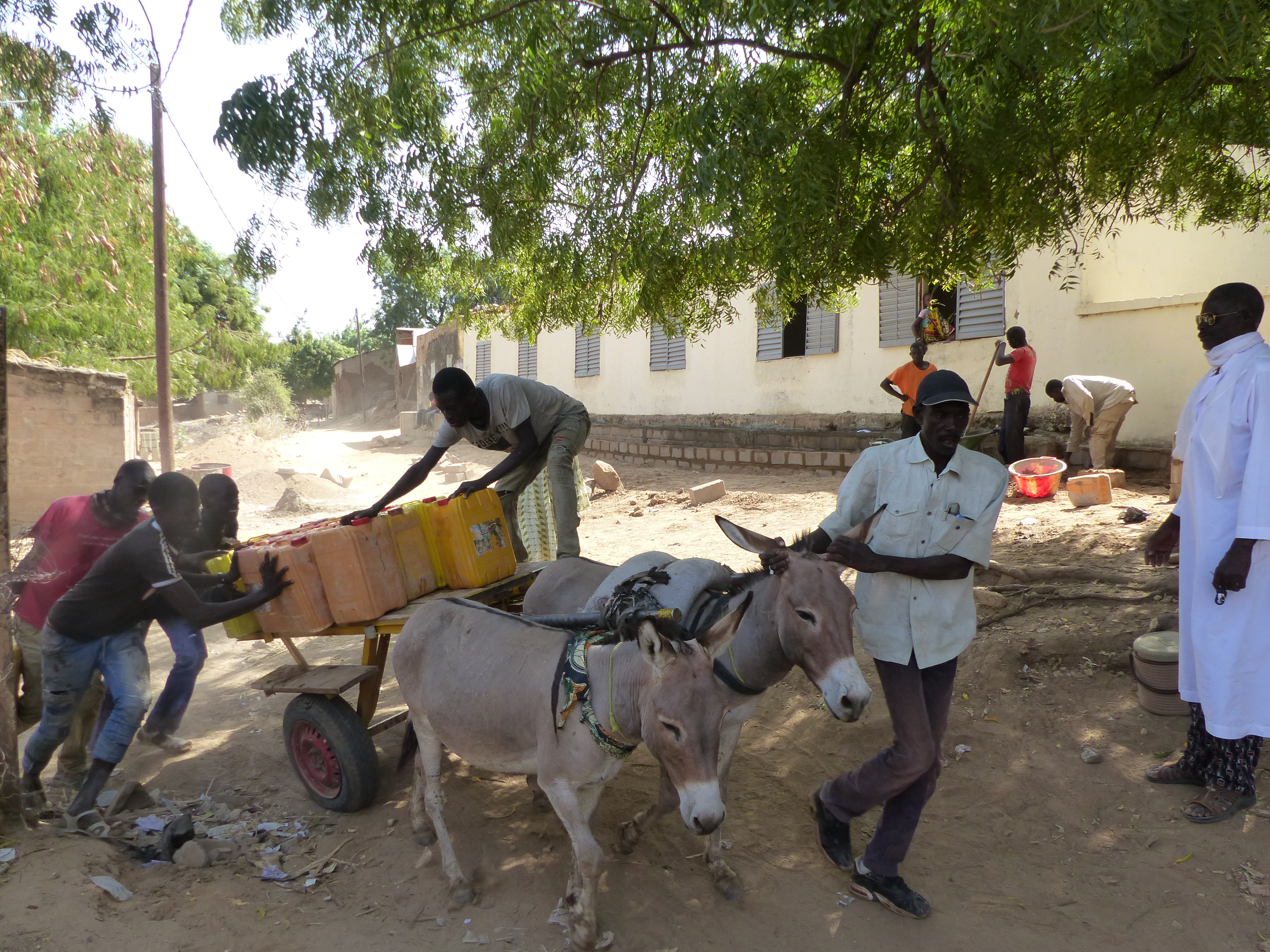 Bauarbeiten in Lany-Tounka im afrikanischen Mali